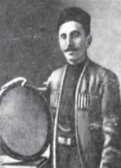 Jabbar Garyagdioglu (1861-1944)